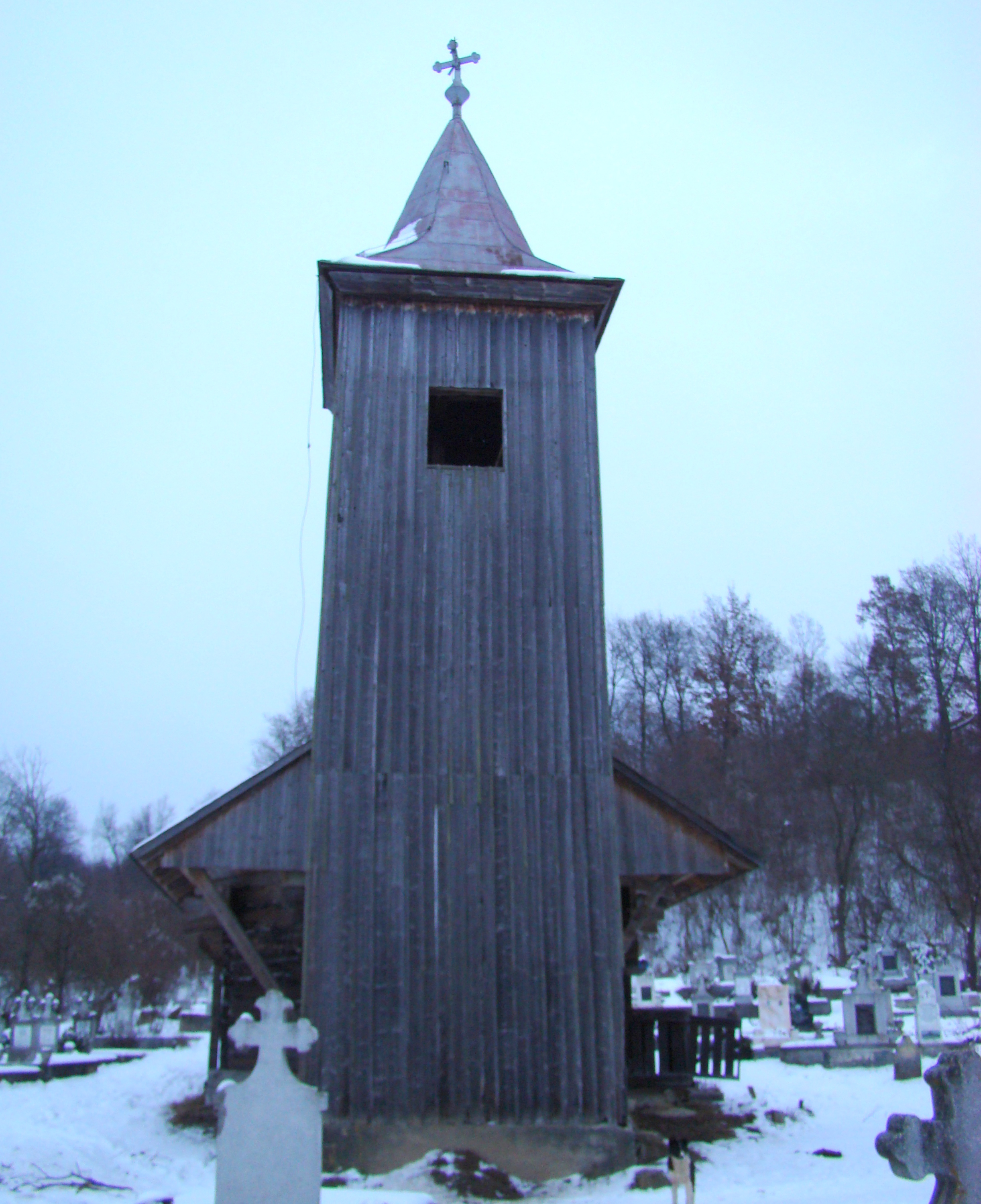 Biserica de lemn din Petelea, Mureș